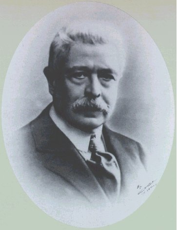 Vittorio Emanuele Orlando, uomo politico italiano, Presidente del Consiglio del Regno d'Italia dal 1917 al 1919.